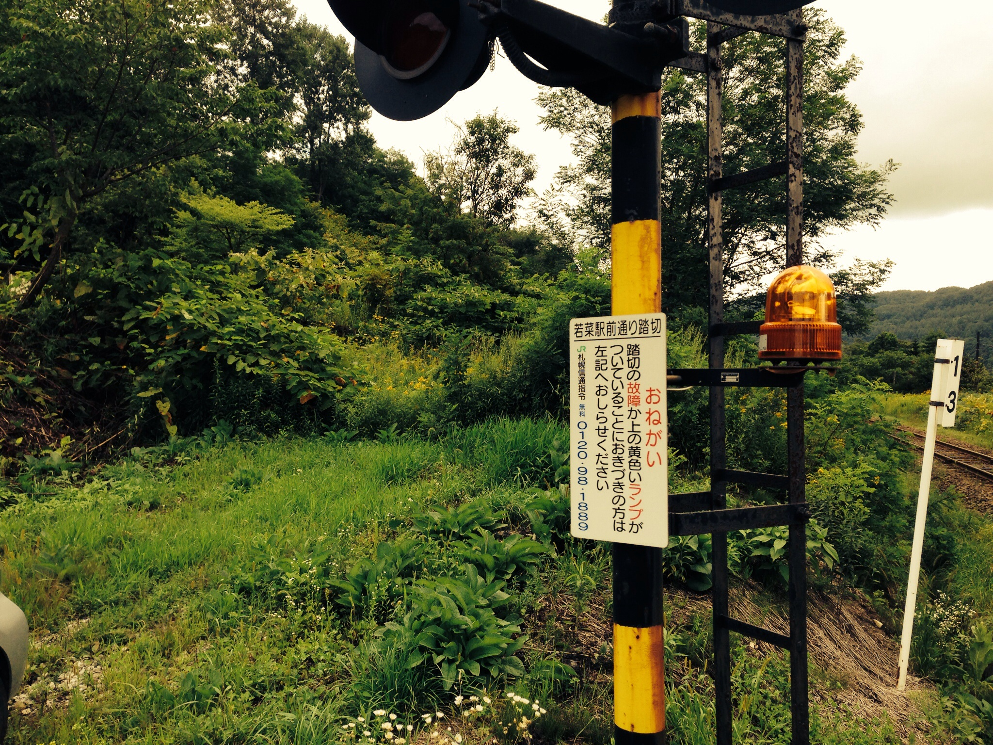 駅跡に隣接する若菜駅前通り踏切